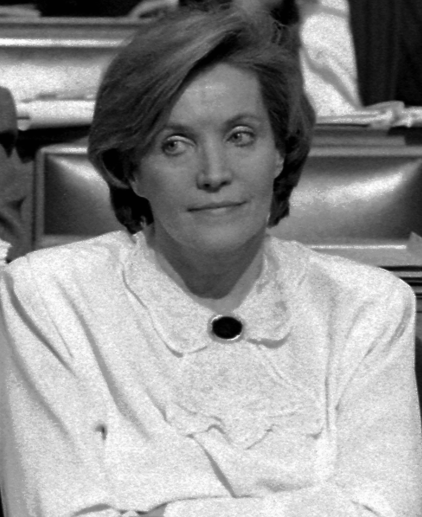 Csehák Judit politikus, egykori miniszterelnök-helyettes, orvos.